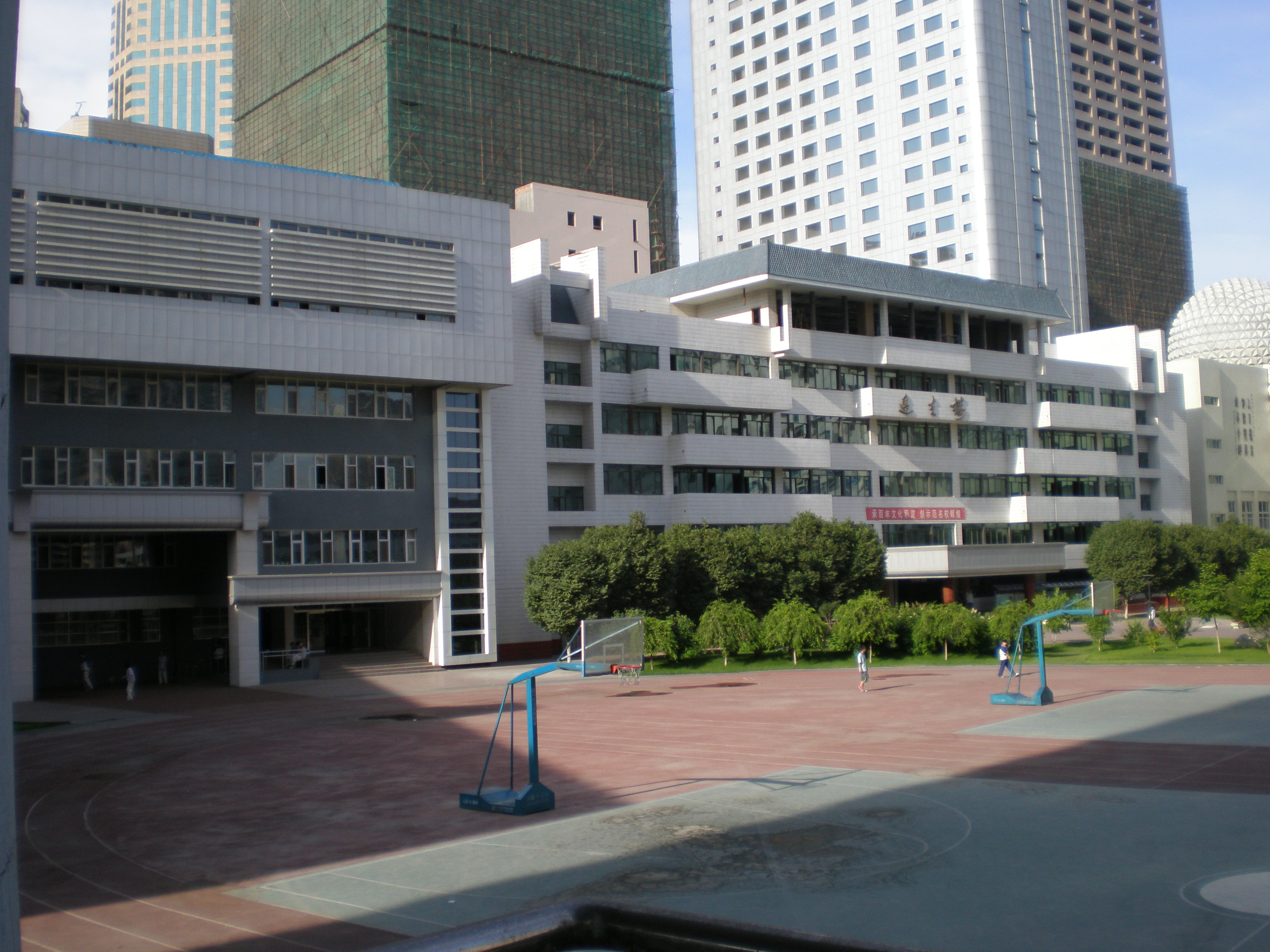 乌鲁木齐市第一中学